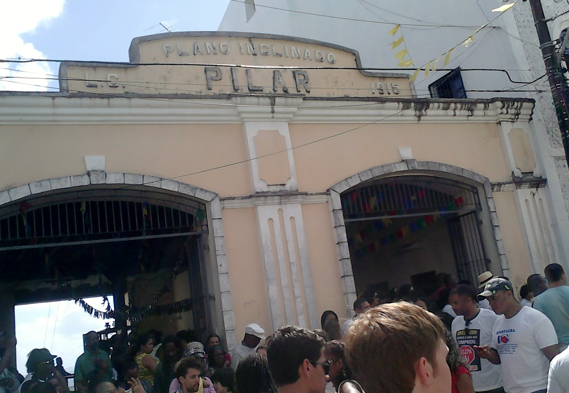 Fachada do Plano Inclinado Pilar durante as comemorações da Festa de Independência da Bahia em 2012.